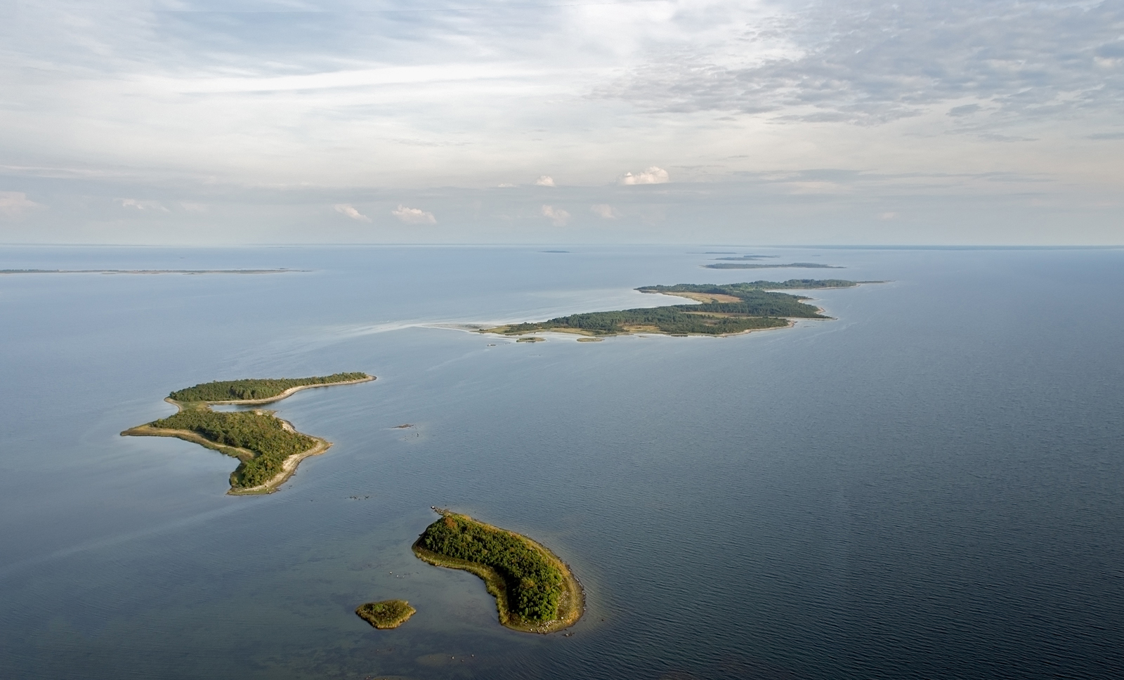 Auklaid, Öakse laid, Saarnaki laid, Hanikatsi laid